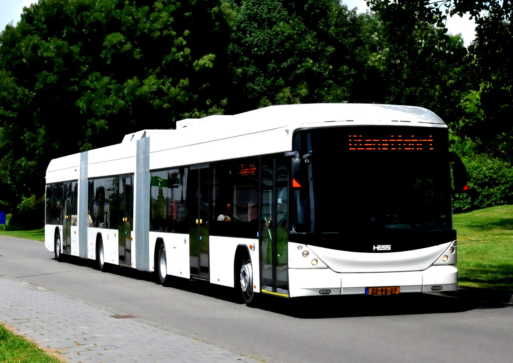 Qbuzz bus 3550, voor ingebruikname vernummerd in: 3490 van het type Hess SwissHybrid tijdens instructie ritten te Groningen. Ook is de bus nog niet in huissteil gebracht.